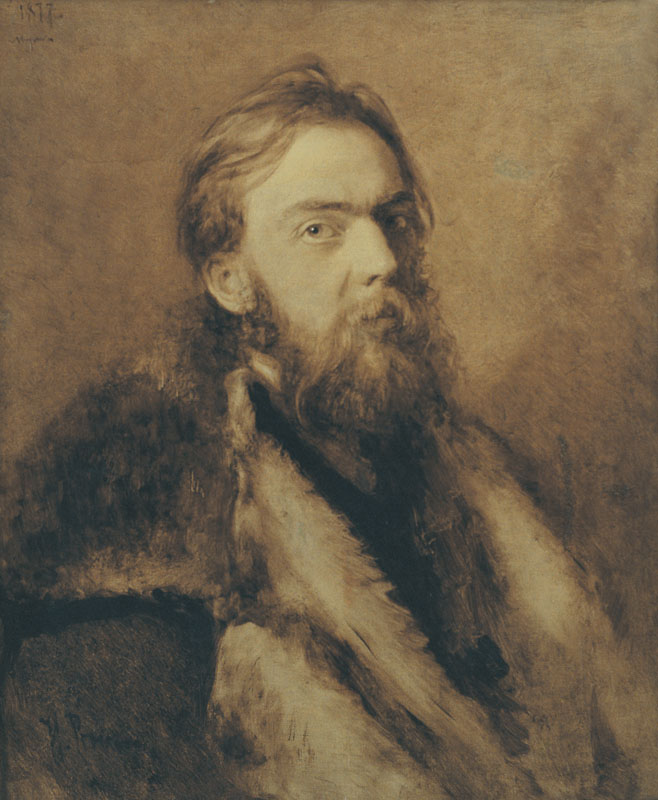 Portrait of Mykola Ivanovich Murashkolabel QS:Len,"Portrait of Mykola Ivanovich Murashko" label QS:Luk,"Микола Мурашко" label QS:Lru,"Портрет художника Николая Ивановича Мурашко"